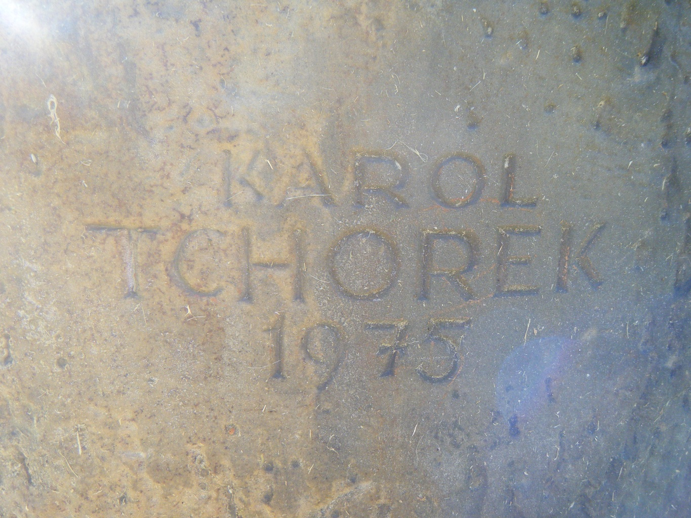 Rzeźba Warszawska Jesień w pobliżu Uniwersytetu Muzycznego im. Fryderyka Chopina w Warszawie na skwerze Bohdana Wodiczki. Wykonana w 1975 roku przez Karola Tchorka. Sygnatura.